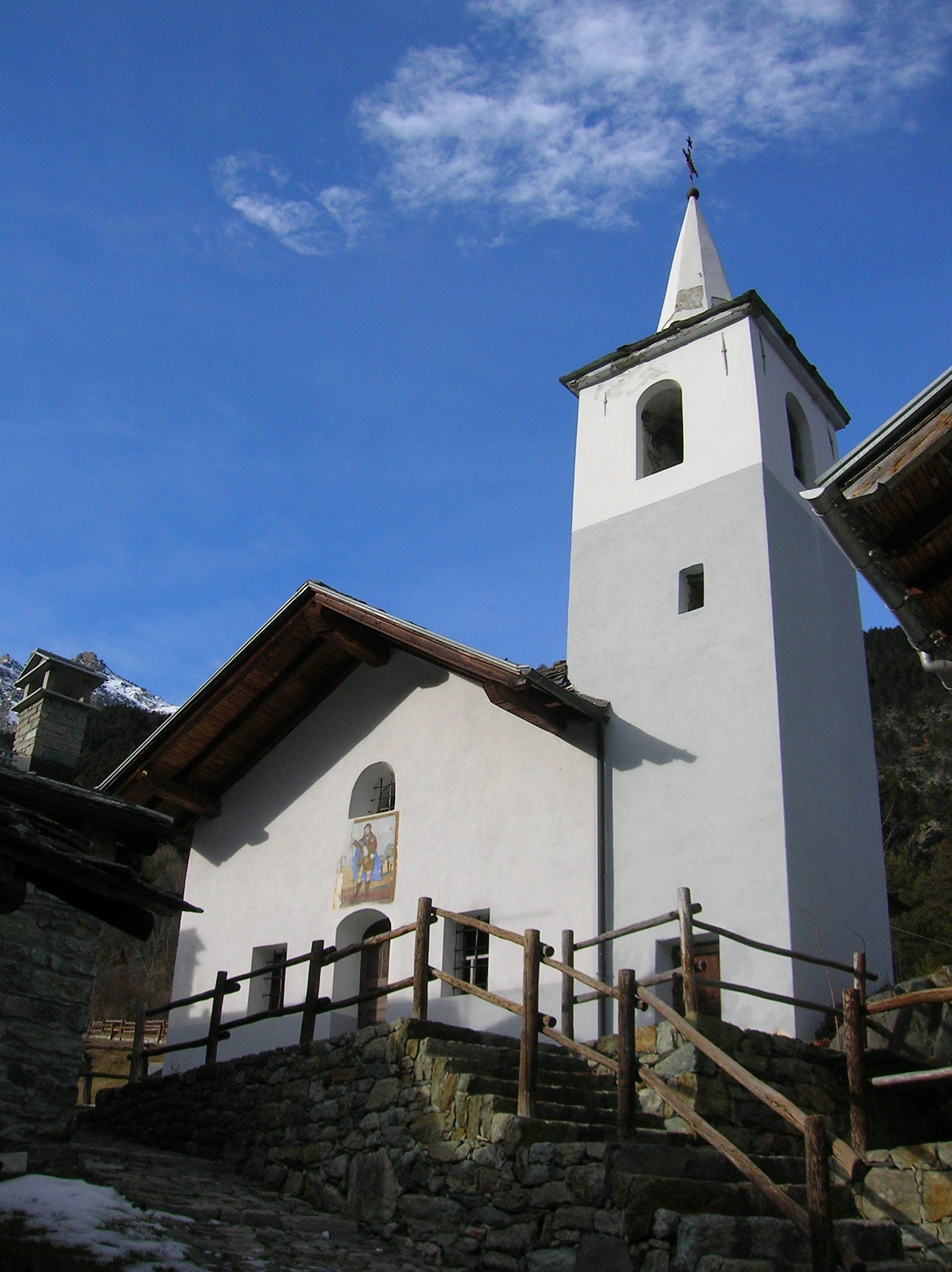 Chiesa in località La Ville - Veulla, Champdepraz, Valle d'Aosta, Italia.